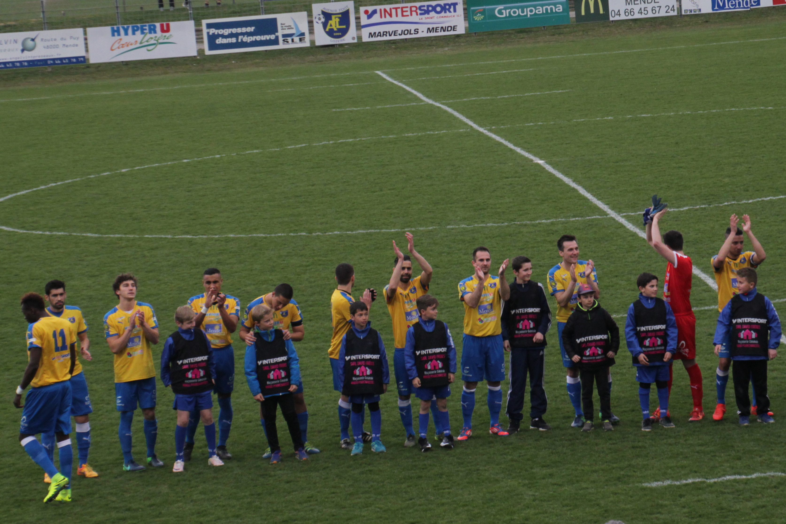 L'équipe de l'Avenir Foot Lozère (CFA2) lors de la rencontre contre la réserve du SC Bastia le 18 mars 2017